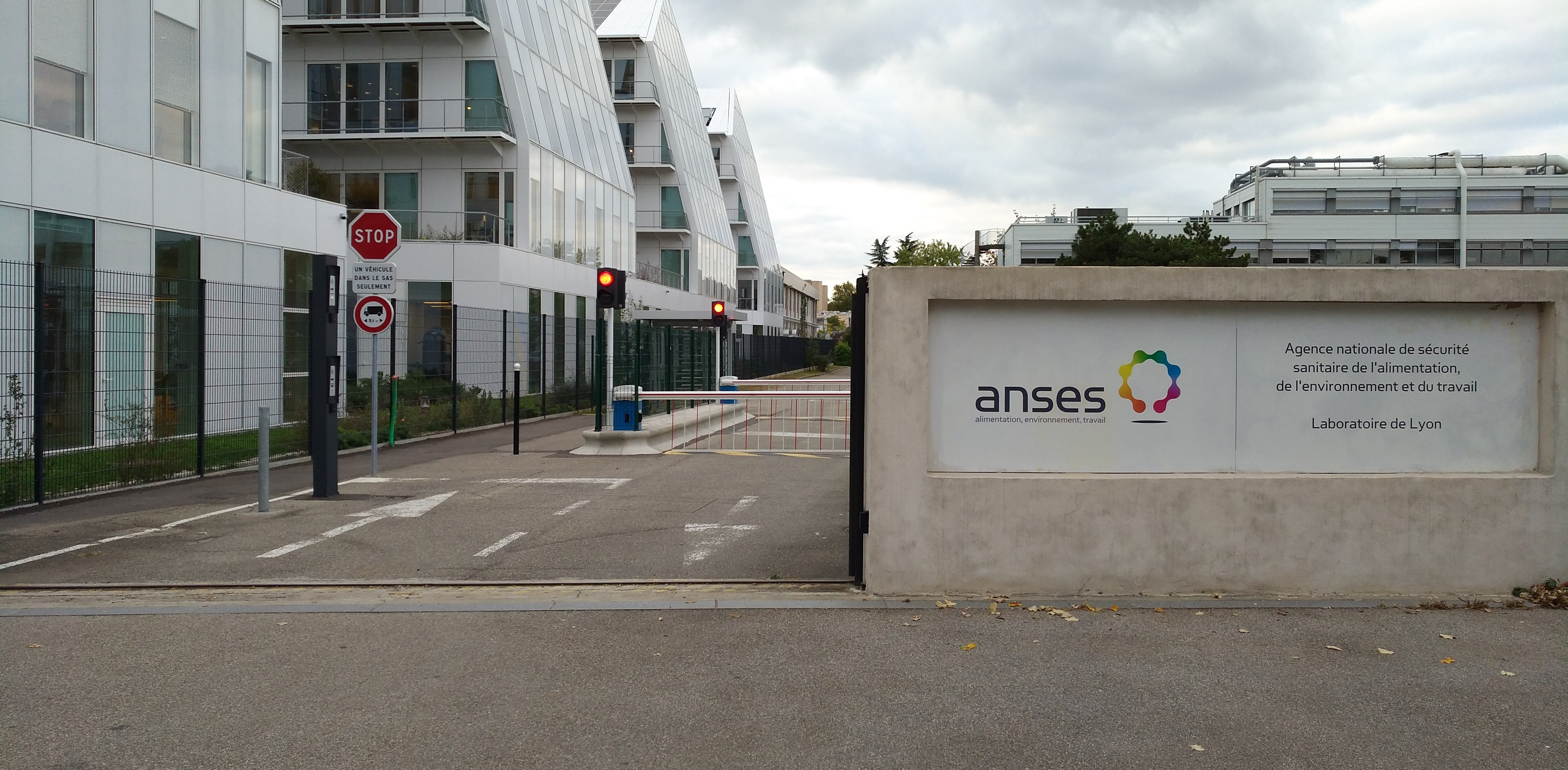 Entrée du site de l'Agence nationale de sécurité sanitaire de l'alimentation, de l'environnement et du travail (Anses), dans le 7e arrondissement de Lyon (France).